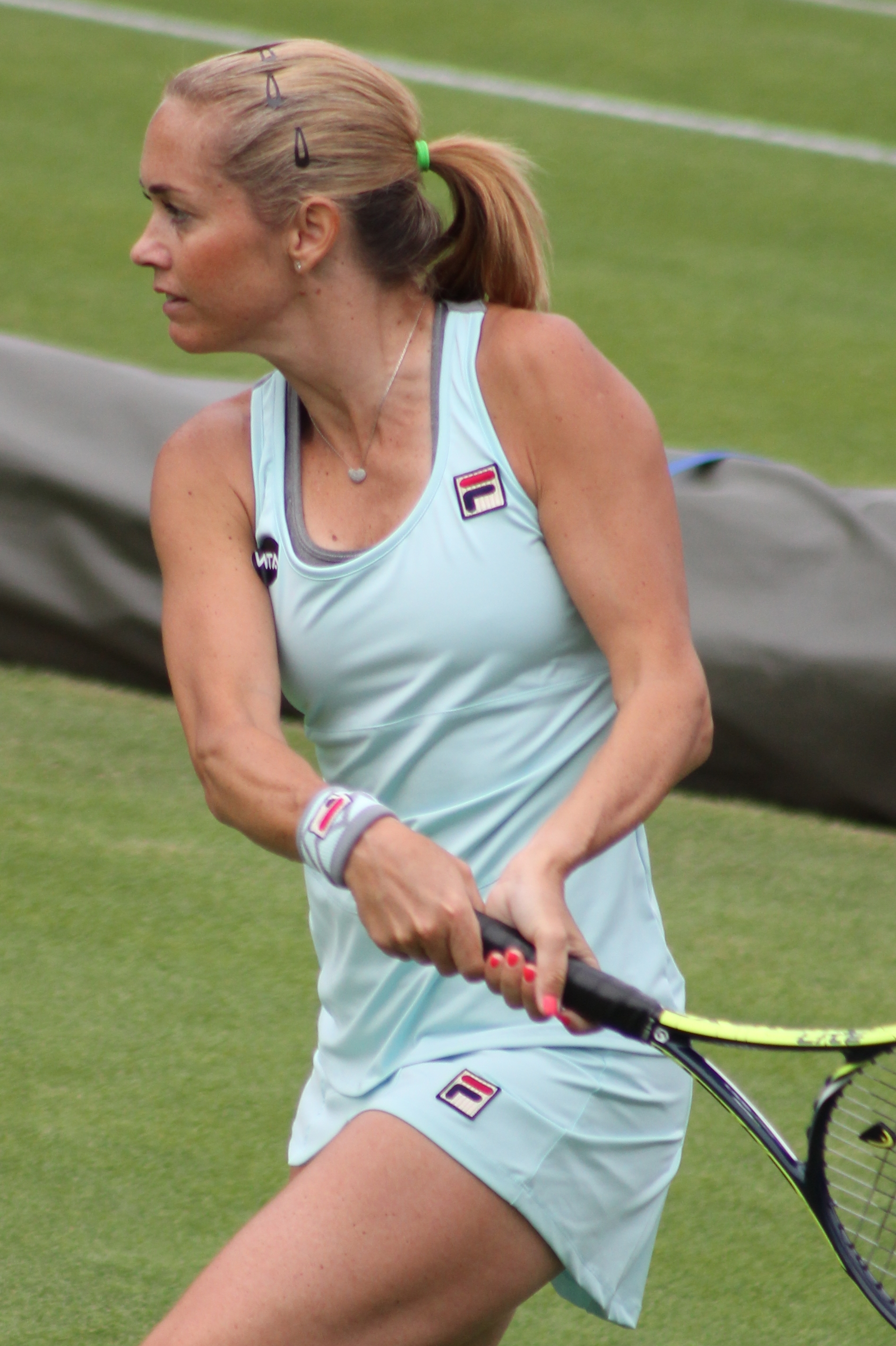 Koukalova BM16 (18)